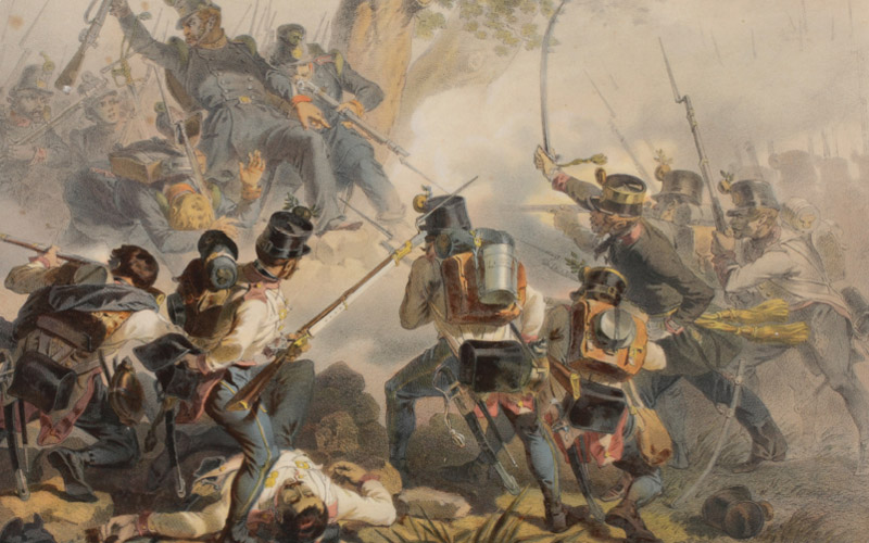 Battaglia di Santa Lucia (6 maggio 1848), particolare.